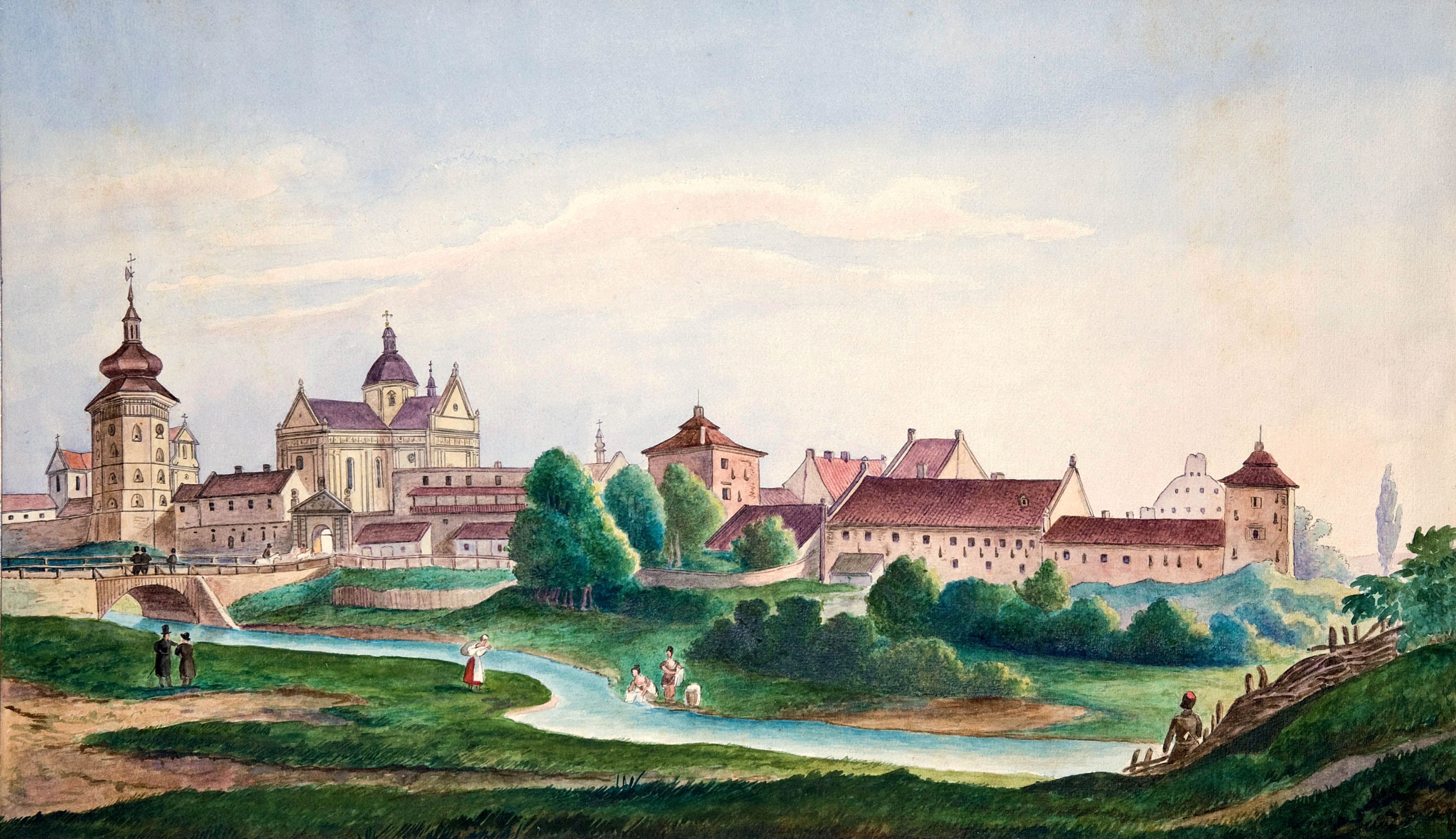 Жовква. Акварель 19 ст. Автор Й. К. Яворський.